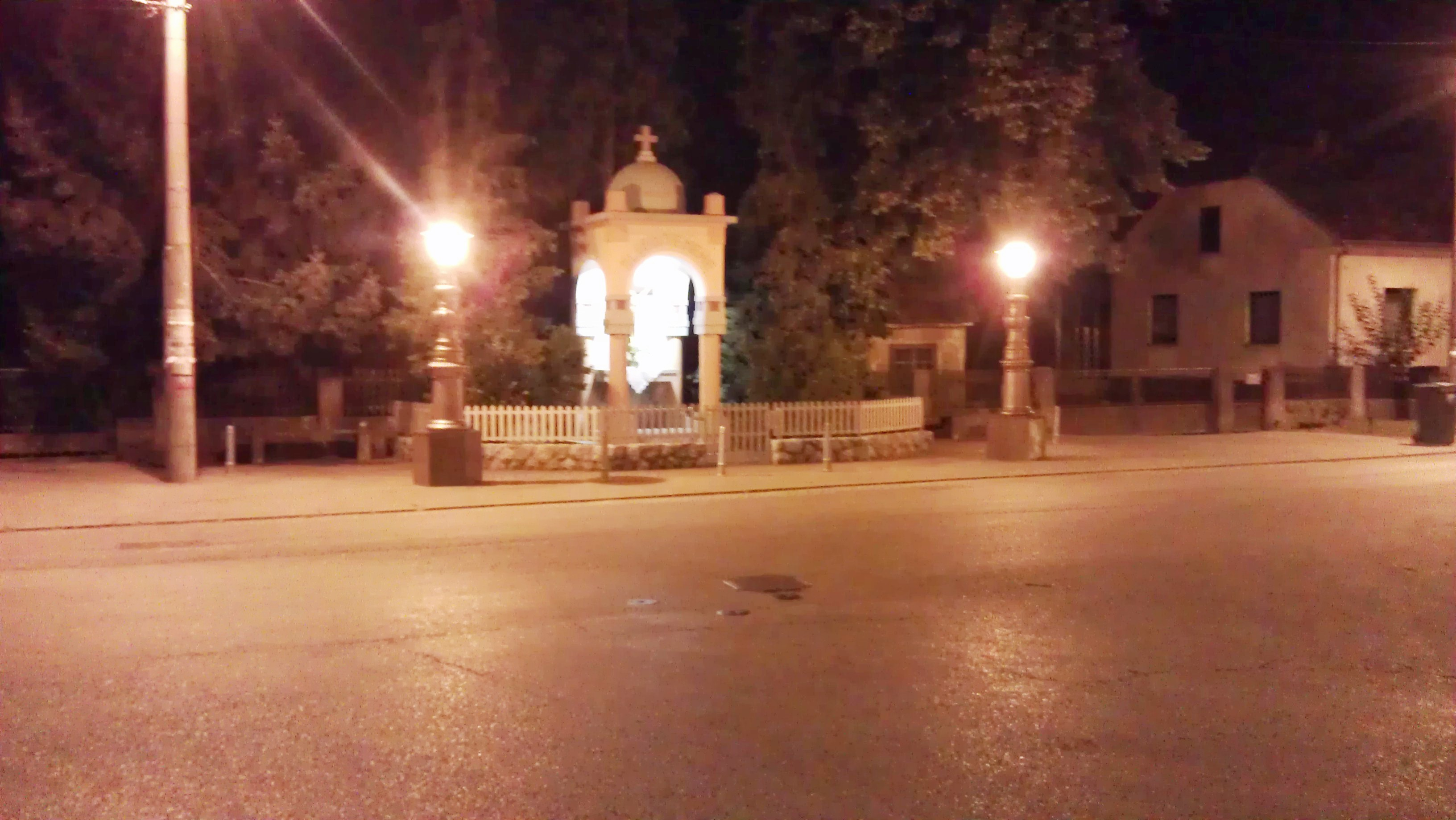 Hrašće Turopoljsko noću